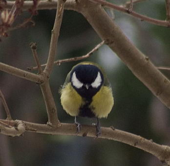 Parus major Photo taken in Rumia, Poland by Adam Kumiszcza.